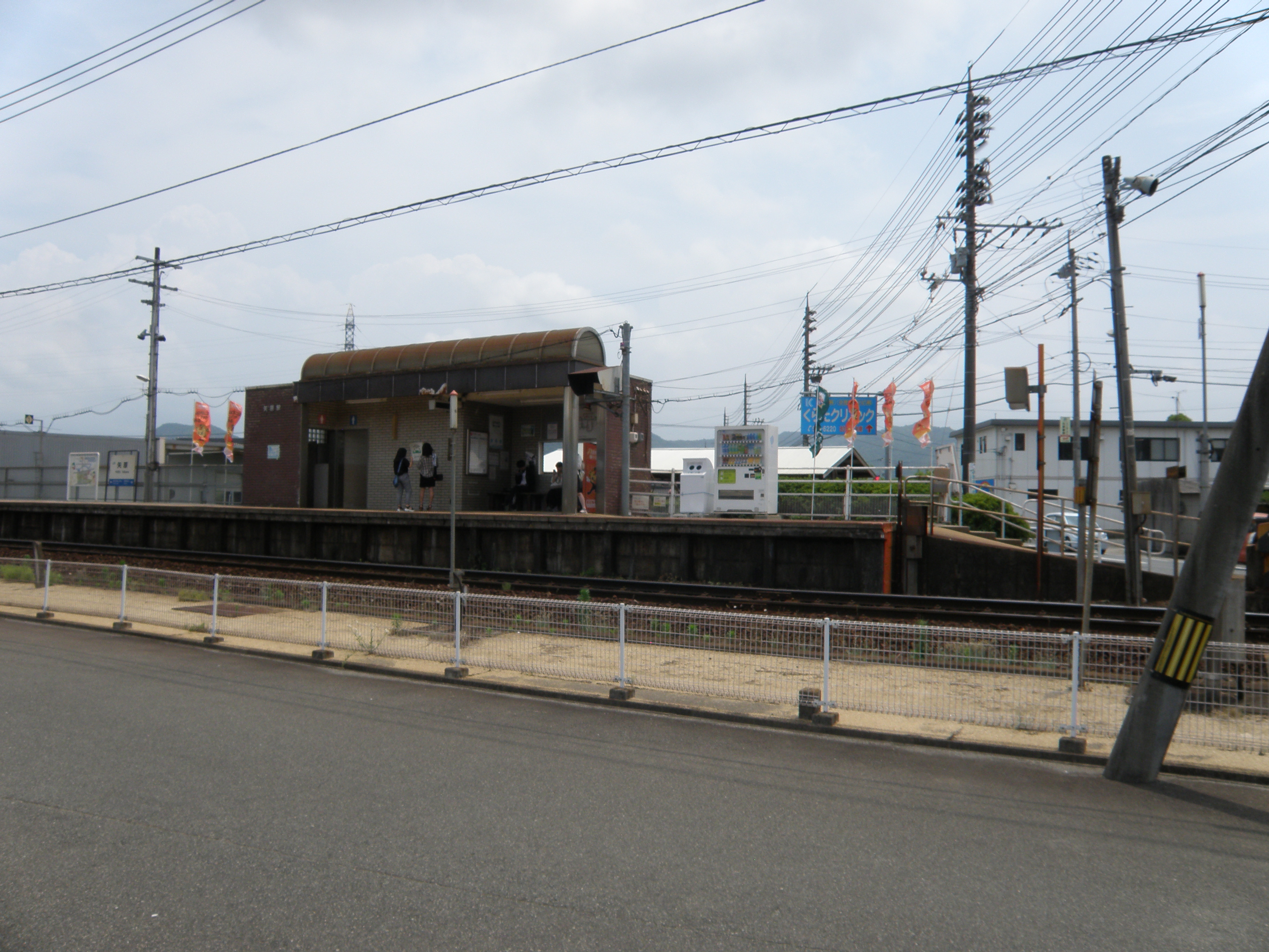 JR山口線矢原駅ホーム